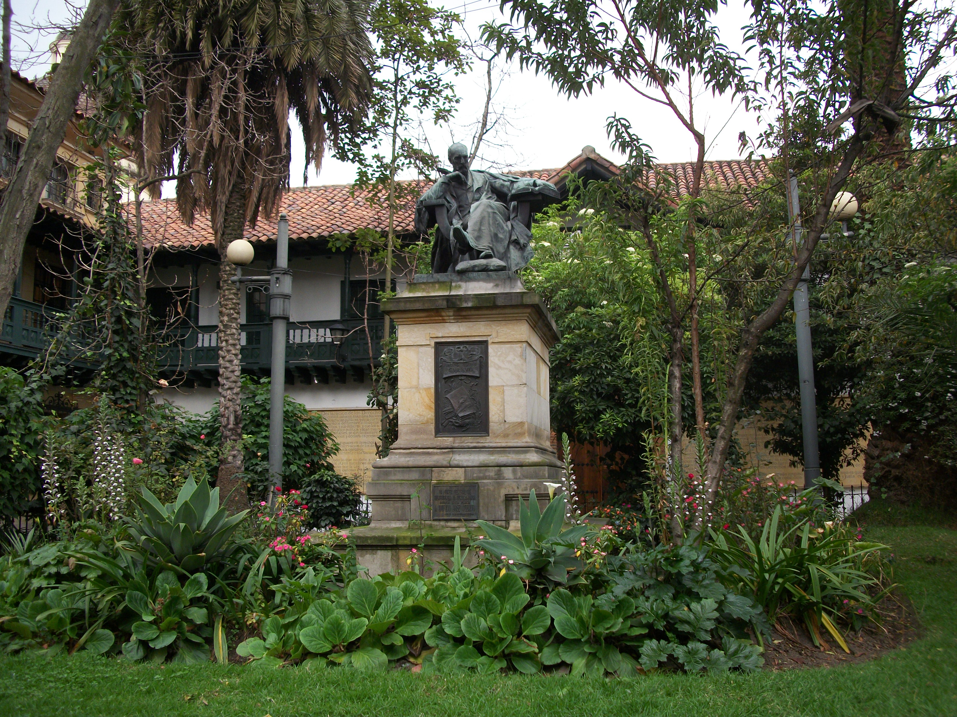 Estatua de Rufino José Cuervo, calle 19 carrera 6. La Candelari, Bogotá.